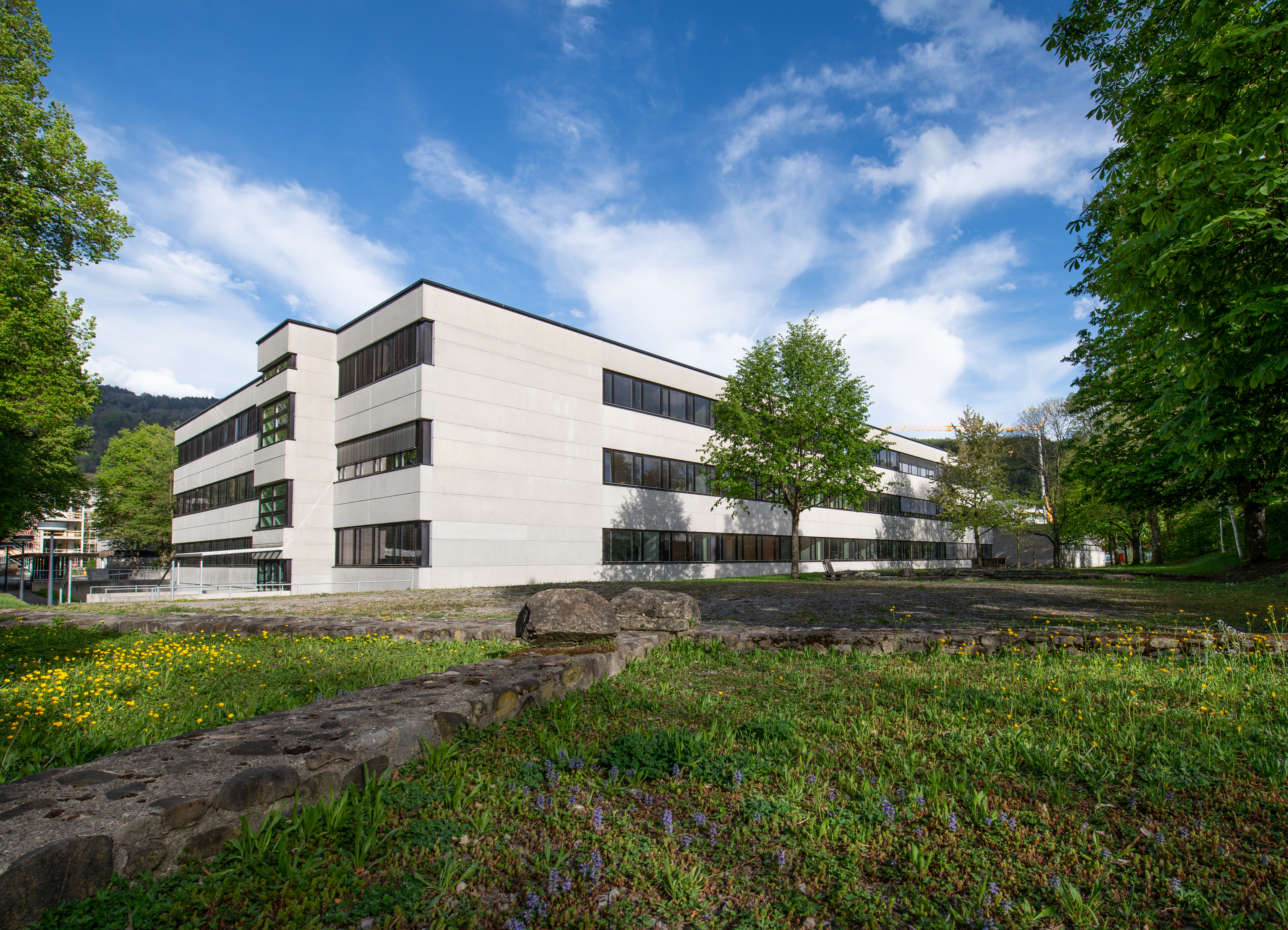 Das Bundesgymnasium Blumenstraße (BG Blumenstraße) ist ein österreichisches Bundesgymnasium in der Vorarlberger Landeshauptstadt Bregenz.